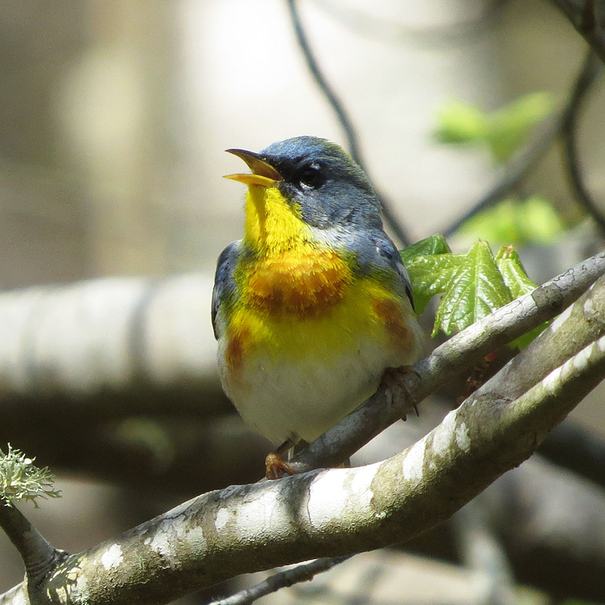 Parula americana 4 apr 15 Cedar Falls Park, SC